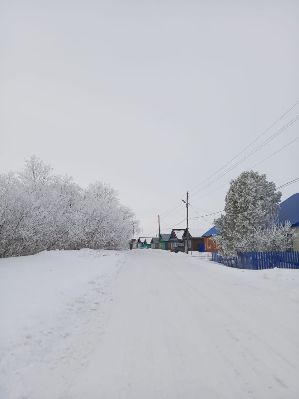 деревня зимой